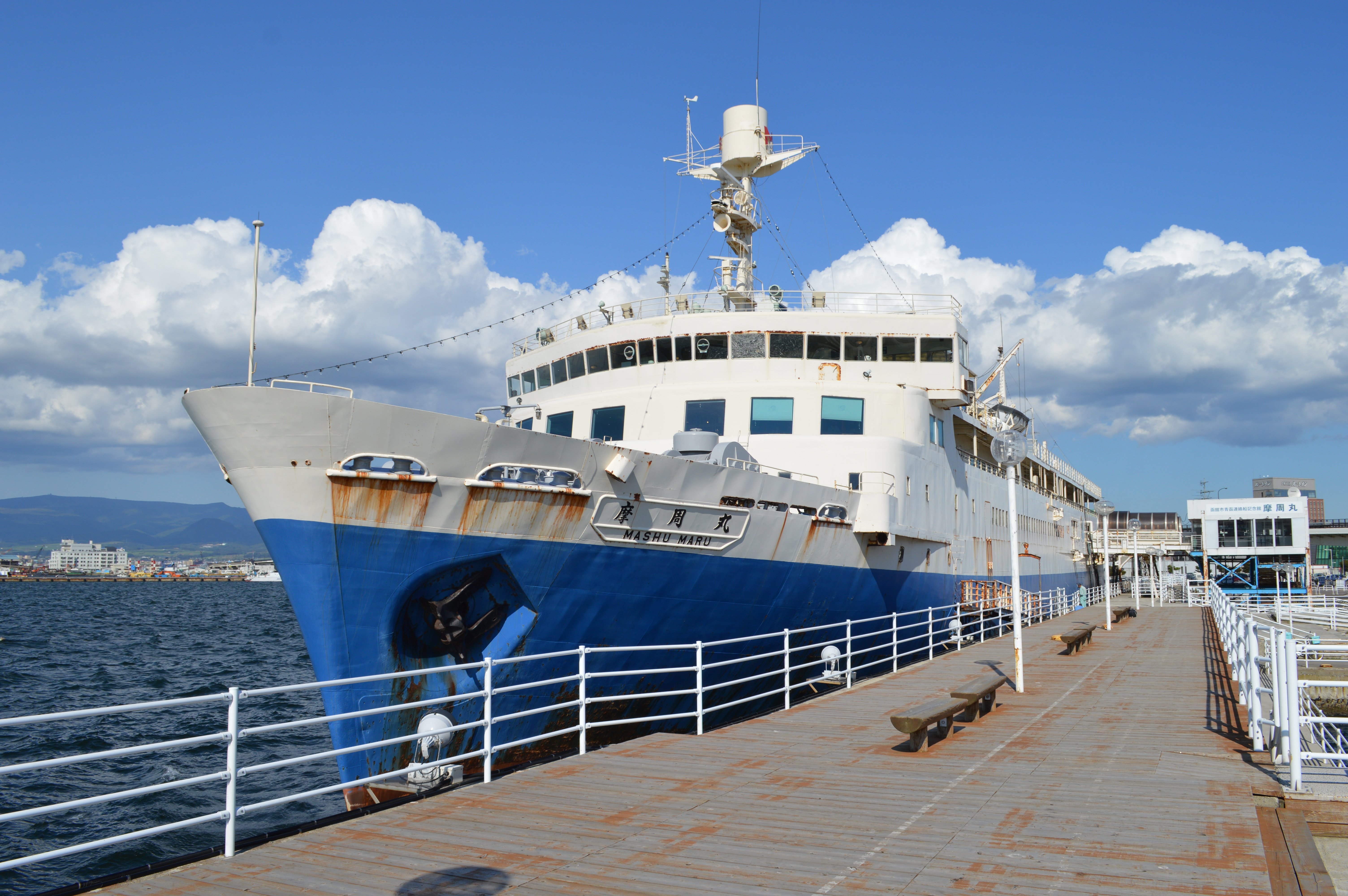 摩周丸 全景